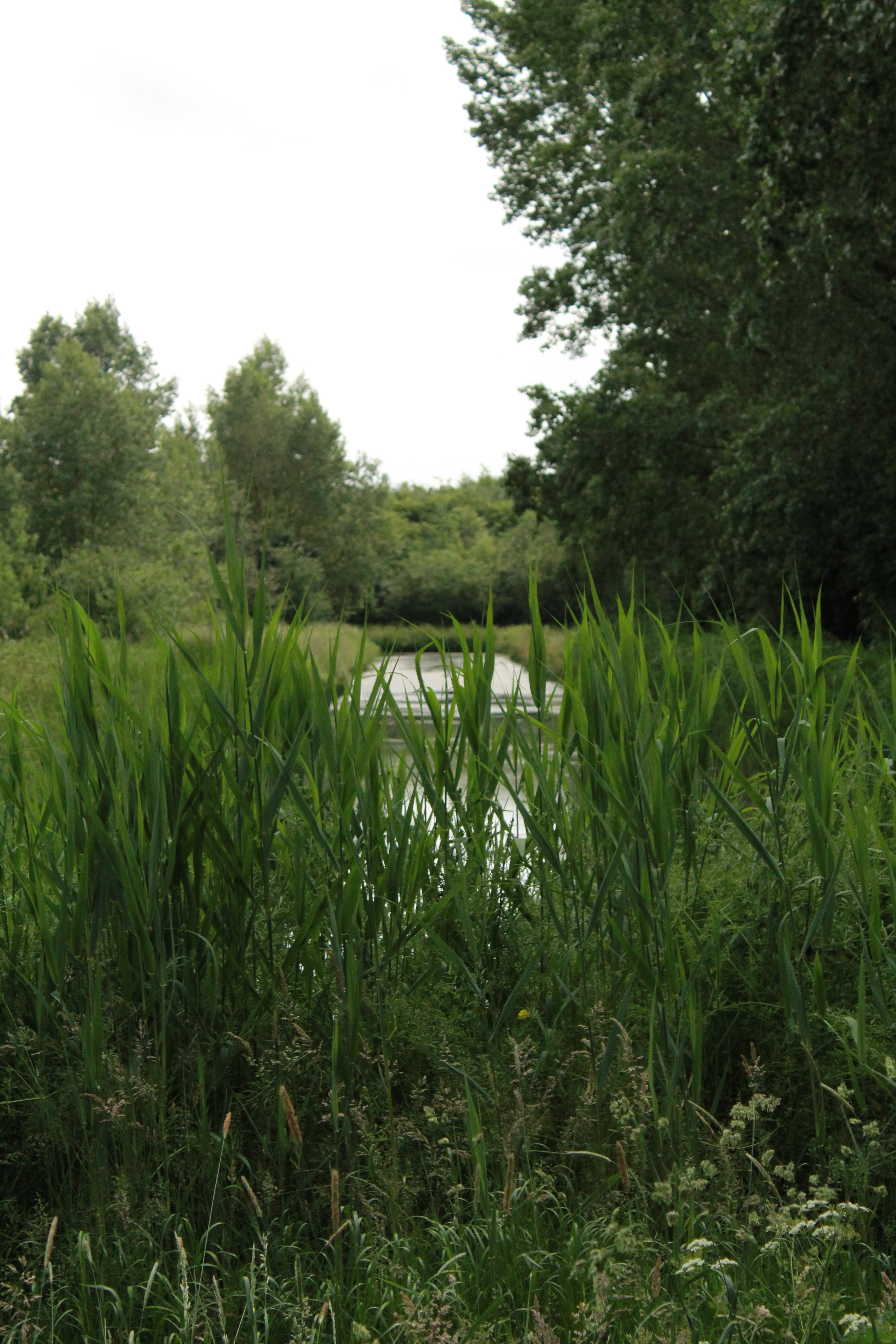 Een rechte sloot in het Zuidelijke deel van het Purmerbos, met waterplanten en riet.